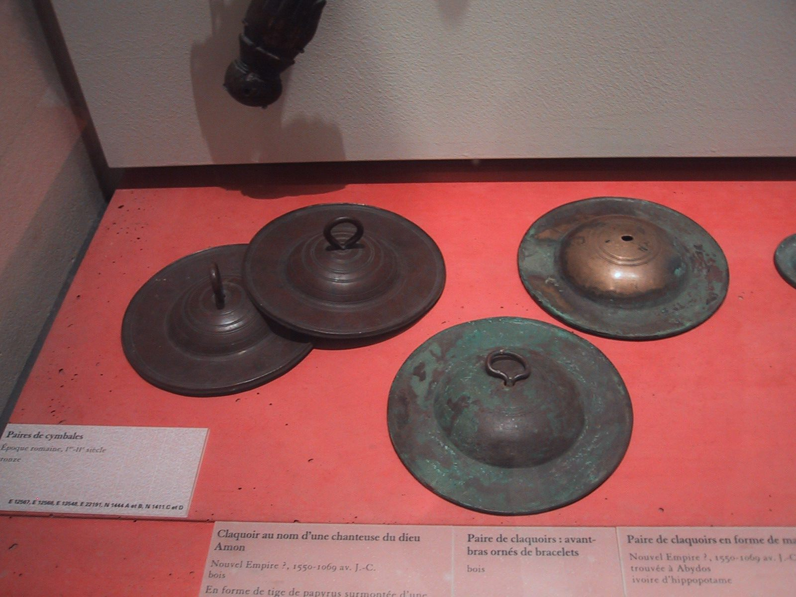 Paires de cymbales. Epoque romaine.